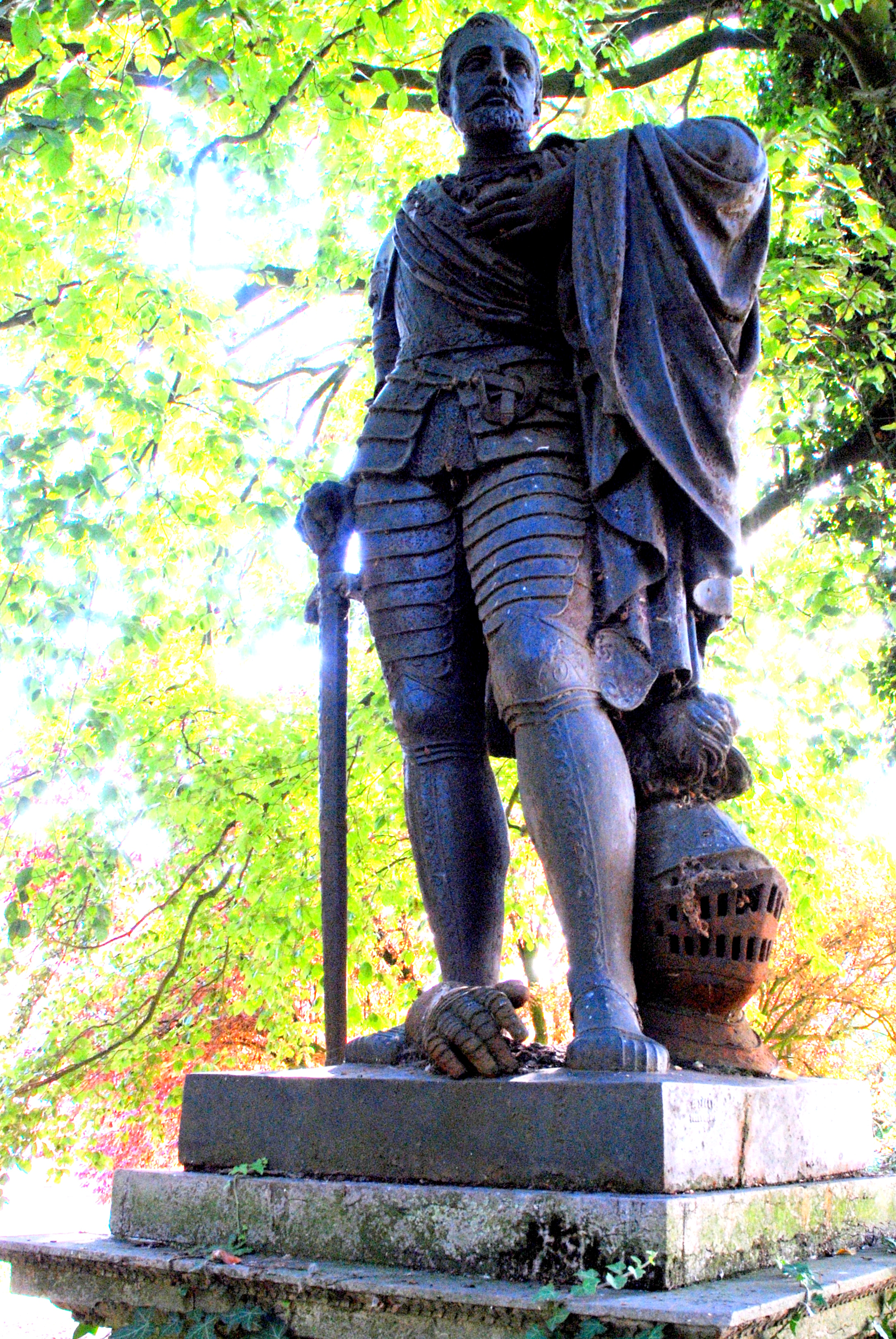 Origineel, gietijzeren standbeeld van Lamoraal van Egmont uit 1872, gegoten in Parijs en opgesteld voor het kasteel van Egmont in Zottegem